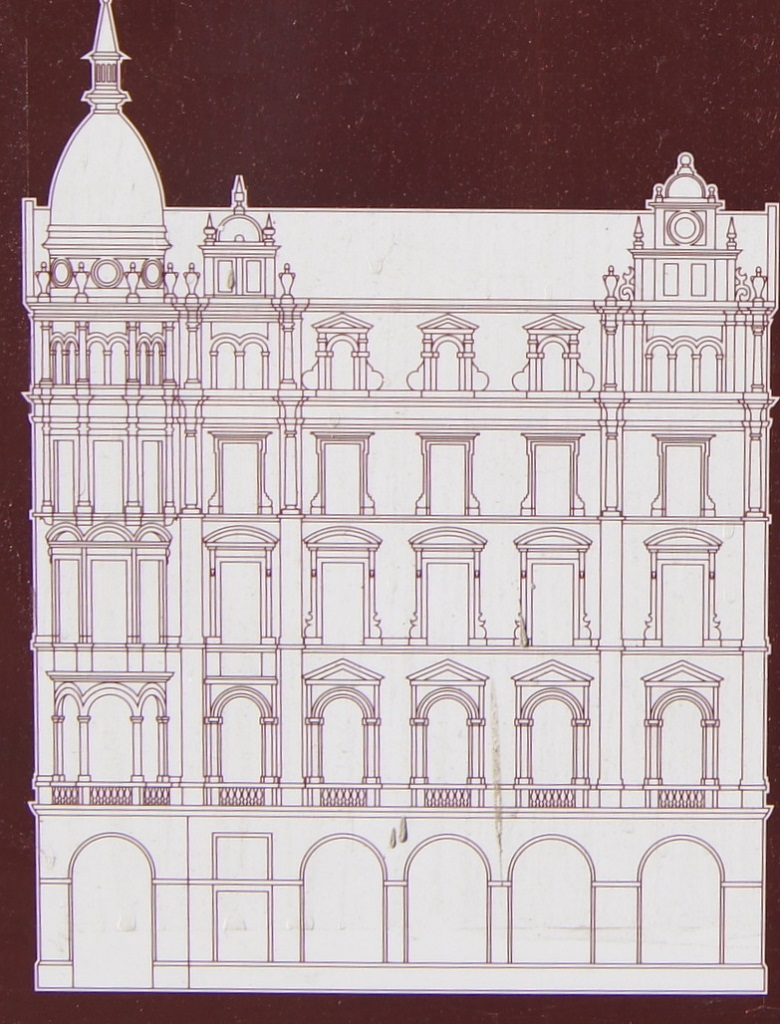 Hotel Monopol, Braunschweig, Zustand 1898